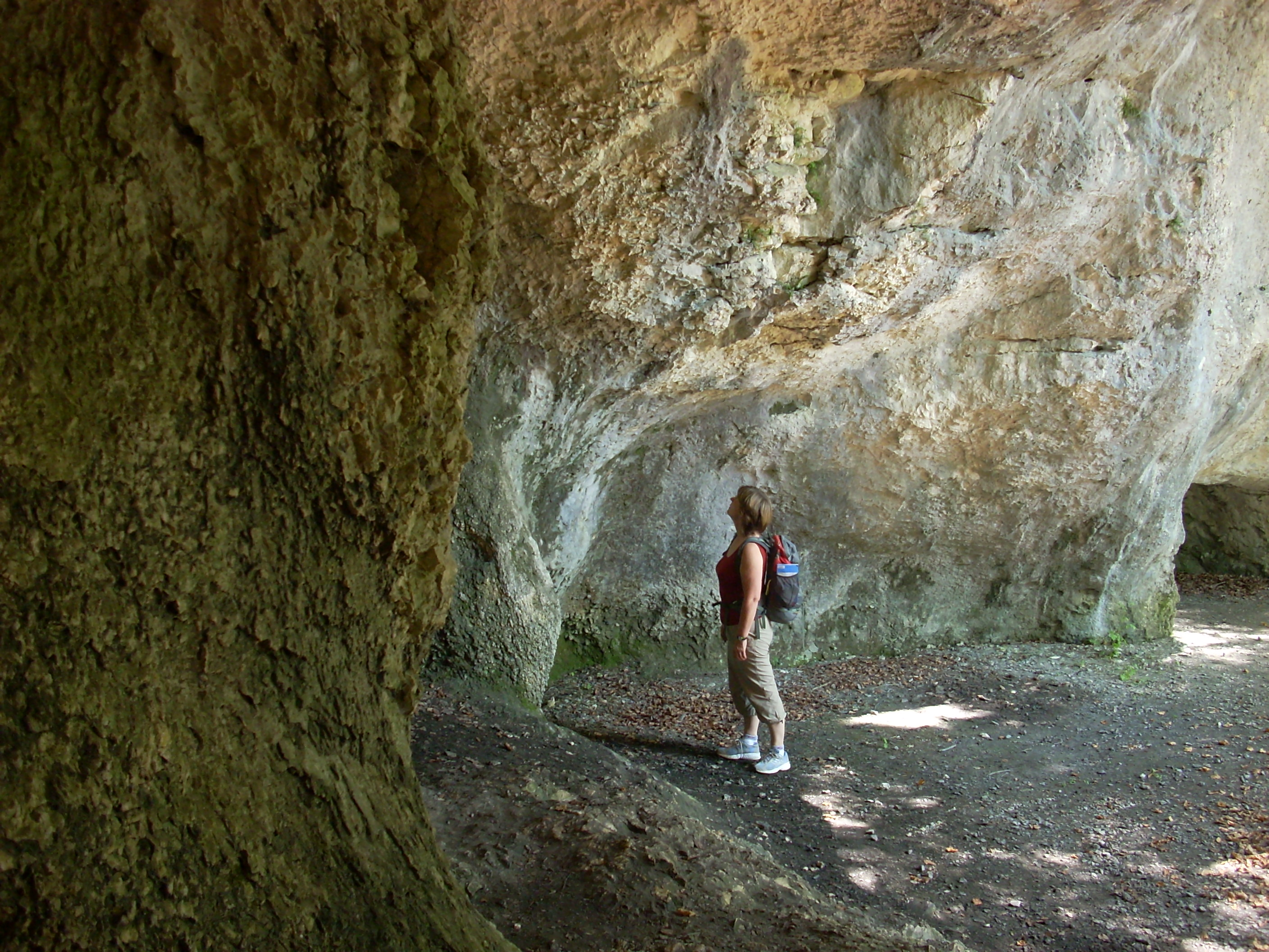 prähistorische "Nebelhöhle" im Fürstlichen Park Inzigkofen. Sie ist etwa 5m hoch und war noch in der Jungsteinzeit bewohnt.